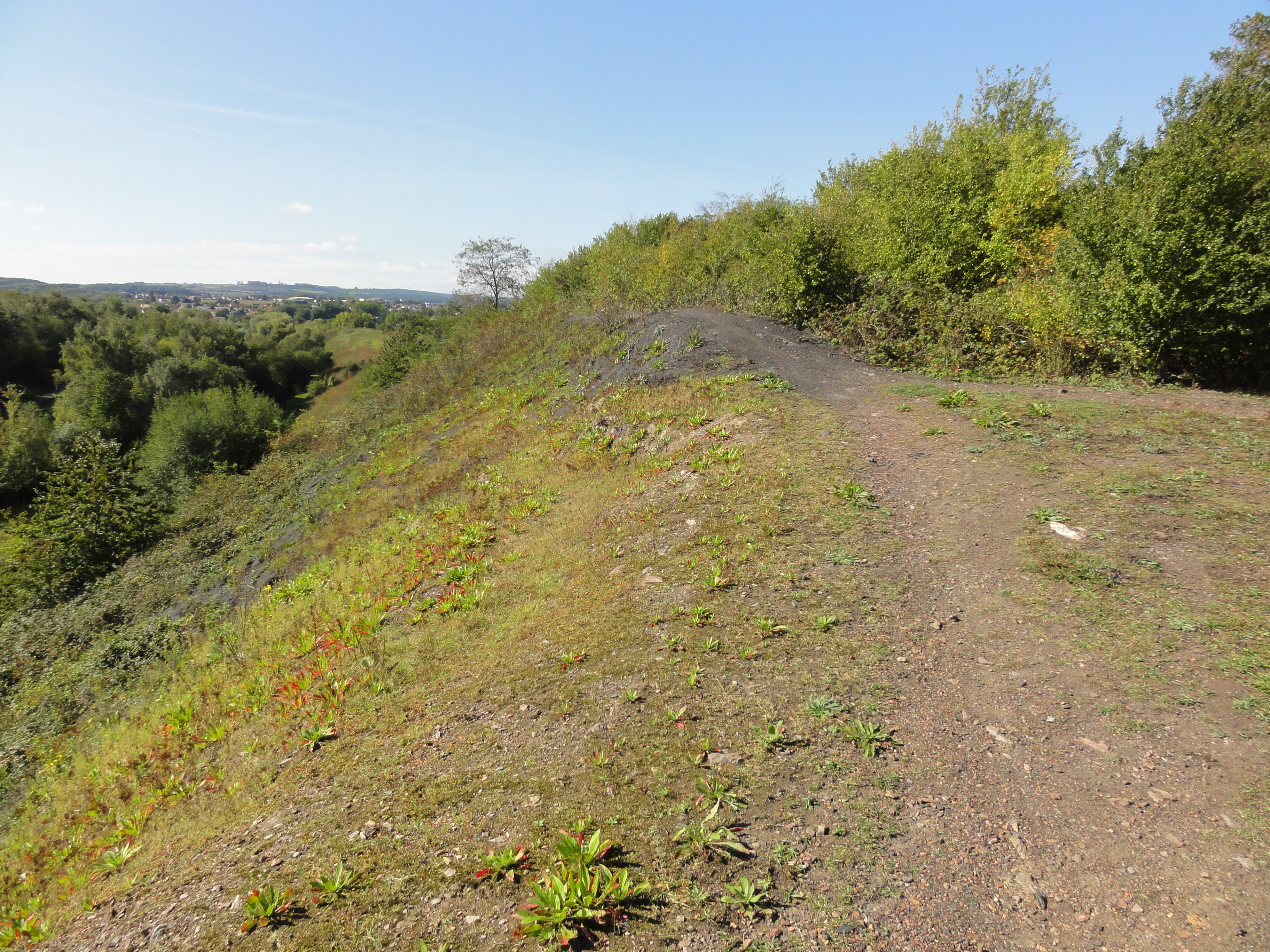 Terril n° 80 dit Abattoir Pont Ampère, fosse n° 3 - 3 bis - 3 ter de la Compagnie des mines de Liévin dans le bassin minier du Nord-Pas-de-Calais, Liévin, Pas-de-Calais, Nord-Pas-de-Calais, France. Le terril no 80 est inscrit sur la liste du patrimoine mondial de l'Unesco le 30 juin 2012 et y constitue en partie le site no 74.